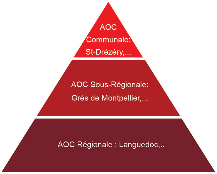 la hiérarchie de l'AOC Saint-Drézéry